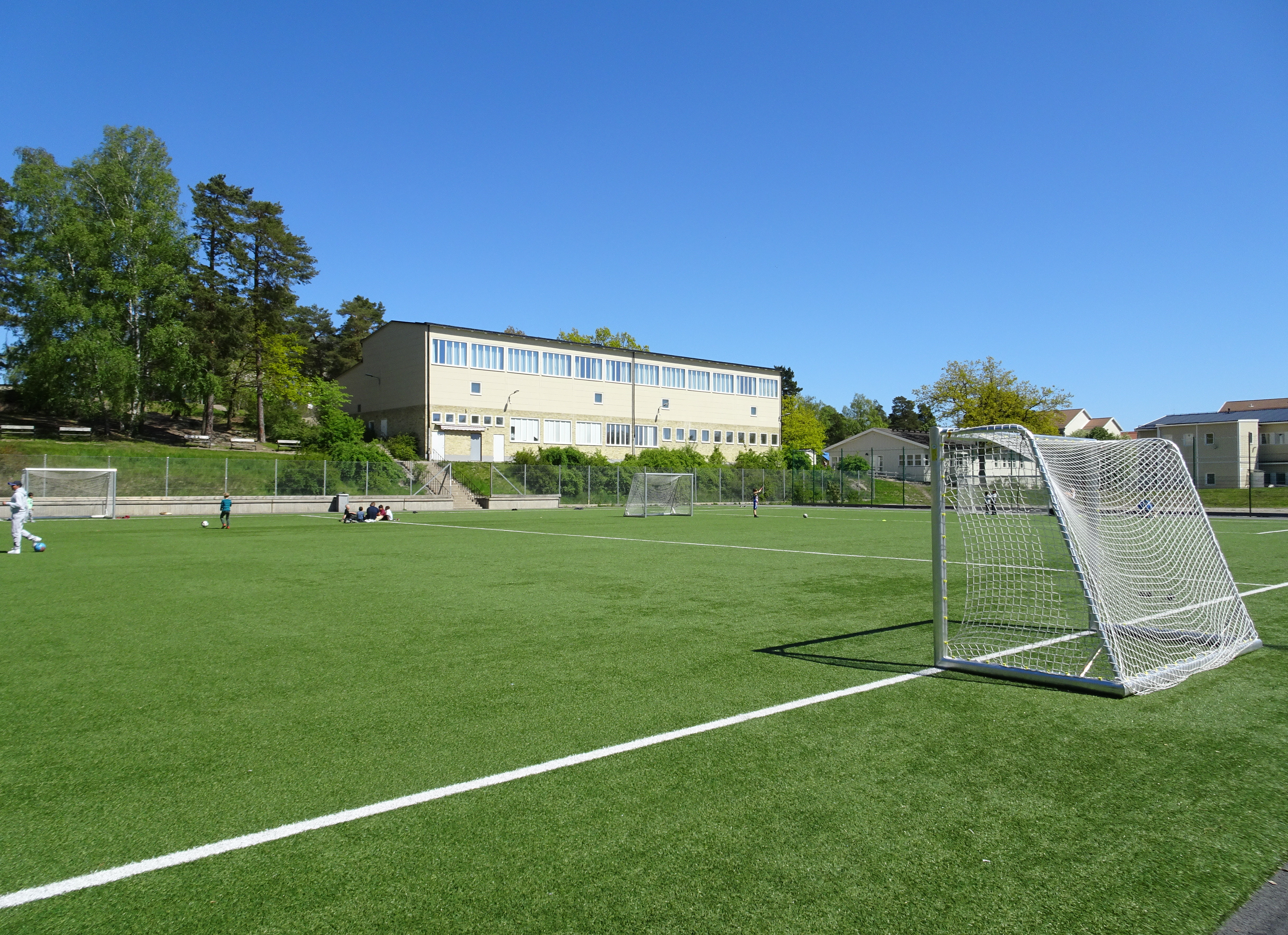 Fruängens skola, gymnastikhall, Ture Ryberg (Arkitekt) Fruängens bollplan i förgrunden